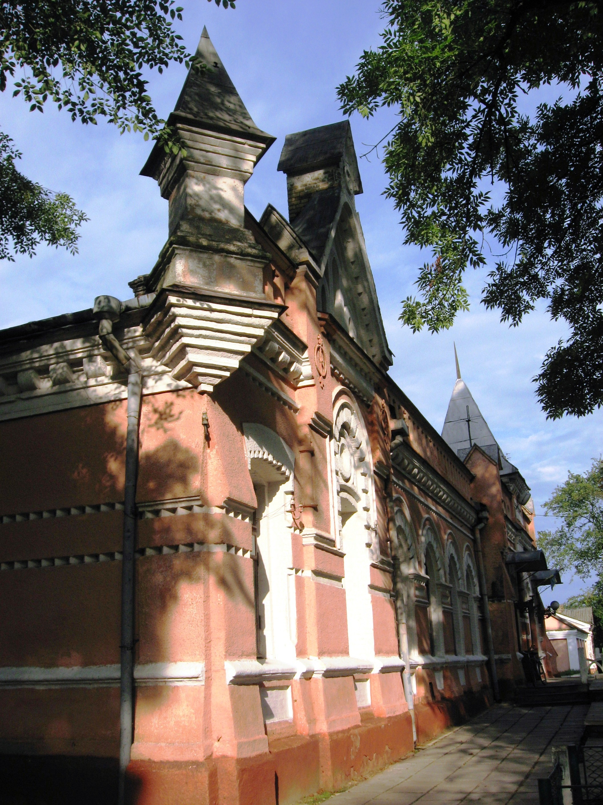 Маневичі. Фрагмент залізничного вокзалу